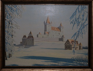 Hrad Radyně, olej na plátně 100x74 cm